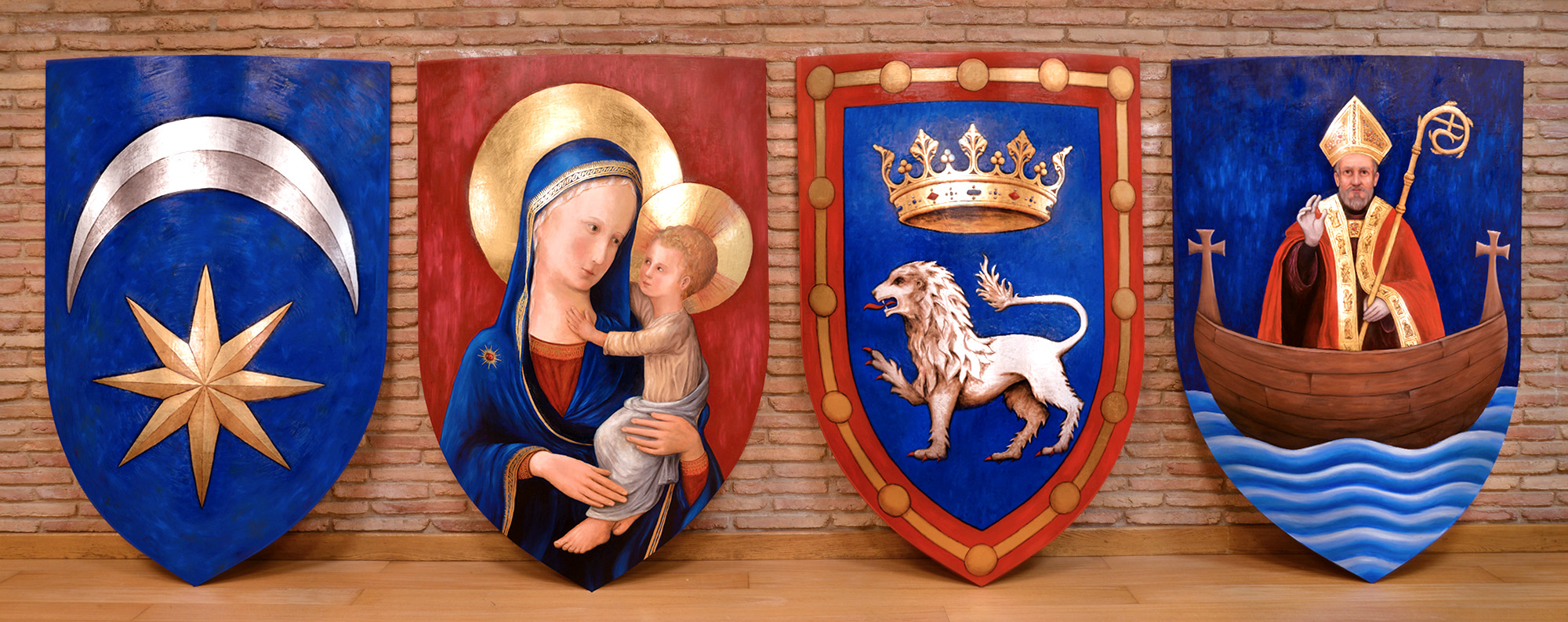 Escudos de los tres antiguos burgos y poblaciones de la ciudad de Pamplona (Navarra), que corresponden por orden, al burgo de San Cernin, la Navarrería, el actual escudo de la ciudad de Pamplona tras la unificación de los burgos, y por último, el de la población de San Nicolás